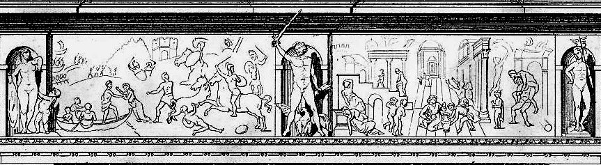 Zeichnung eines relief-verzierten Sandsteinkamins auf Schloss Hugenpoet in Essen-Kettwig